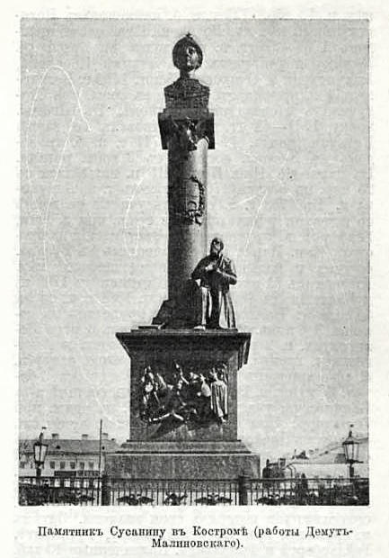 Памятник Ивану Суанину в городе Костроме (работы В. И. Демут-Малиновского). Эта фотография была использована для иллюстрирования статьи «Кострома» опубликованной в тринадцатом томе «Военной энциклопедии», который был издан книгоиздательским товариществом И. Д. Сытина в 1913 году в столице Российской империи городе Санкт-Петербурге. Более подробное описание к этой картинке можно прочесть в указанной выше статье.